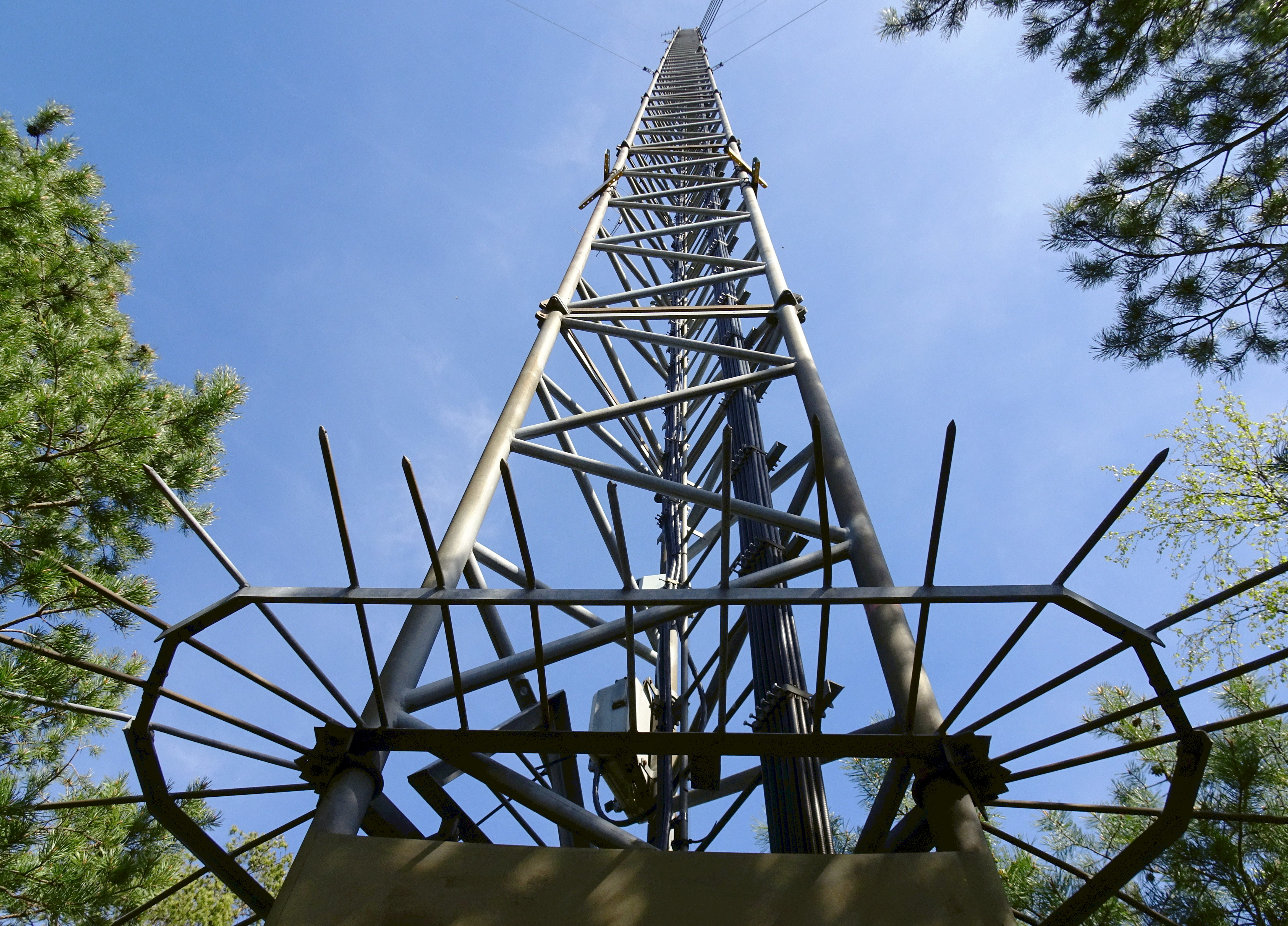 Antenn för ledningscentralen Vargen, Huddinge